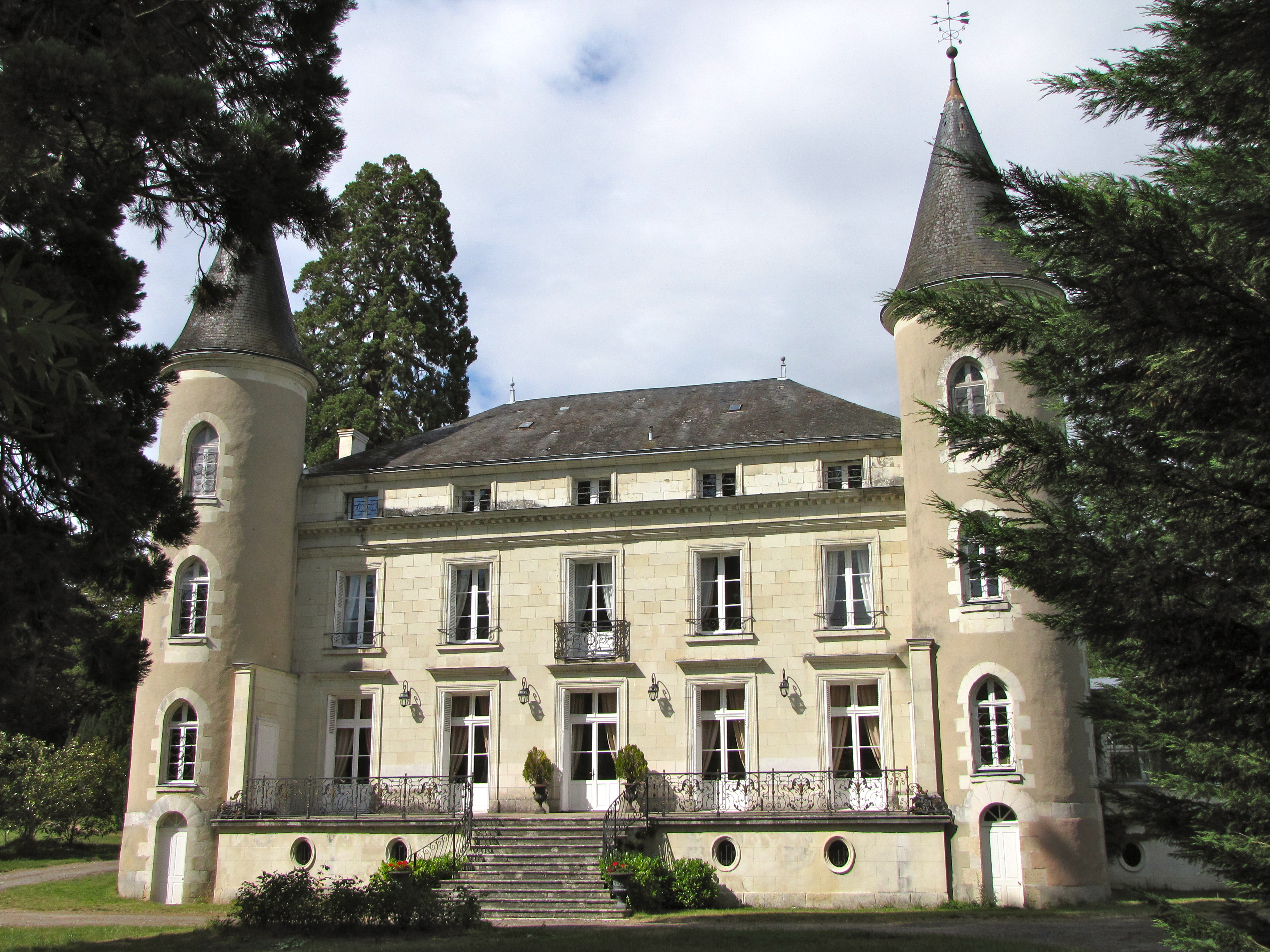 Façade du Château Les Vallées à Tournon Saint Pierre ( Indre et Loire )